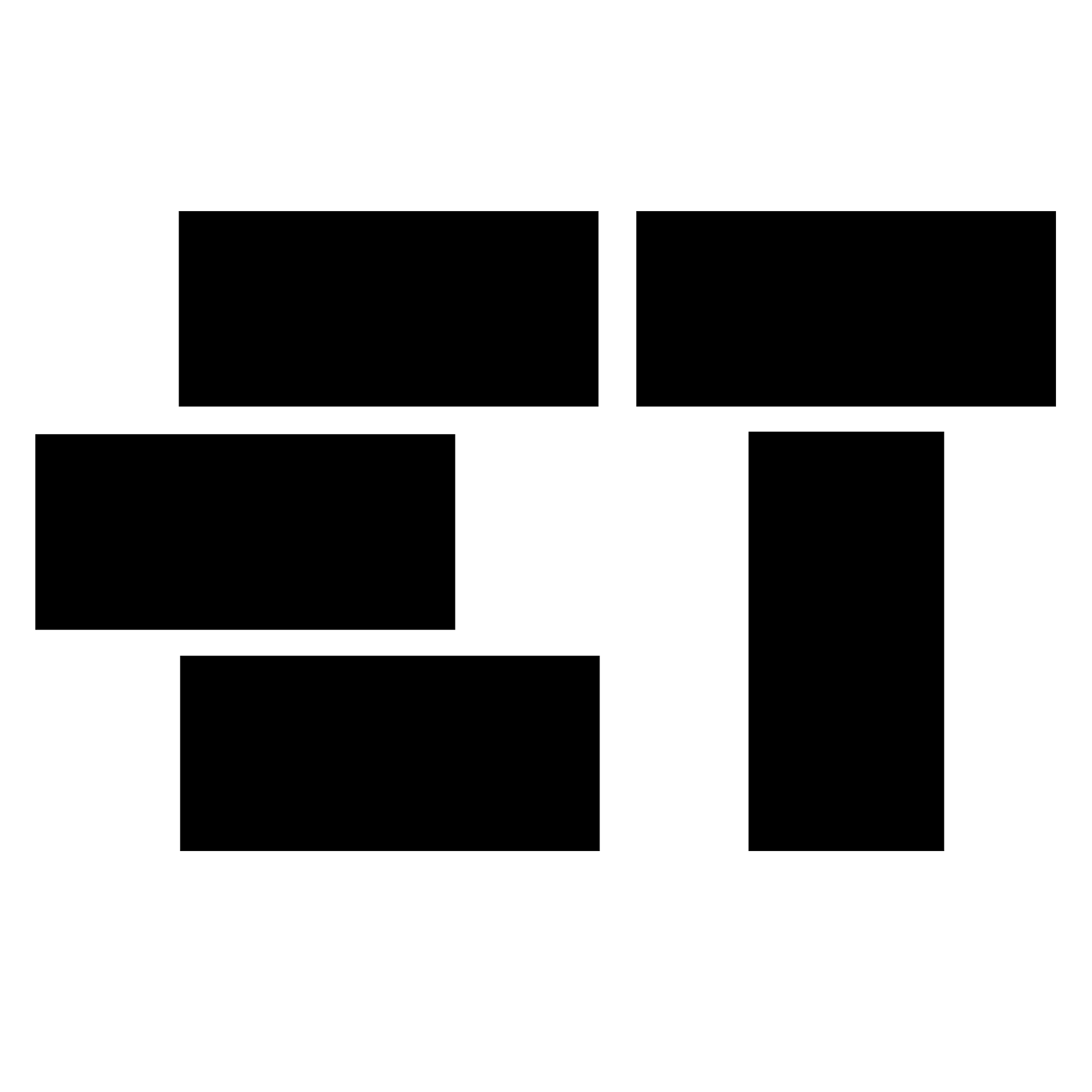 Logotipo de Ediciones de la Torre